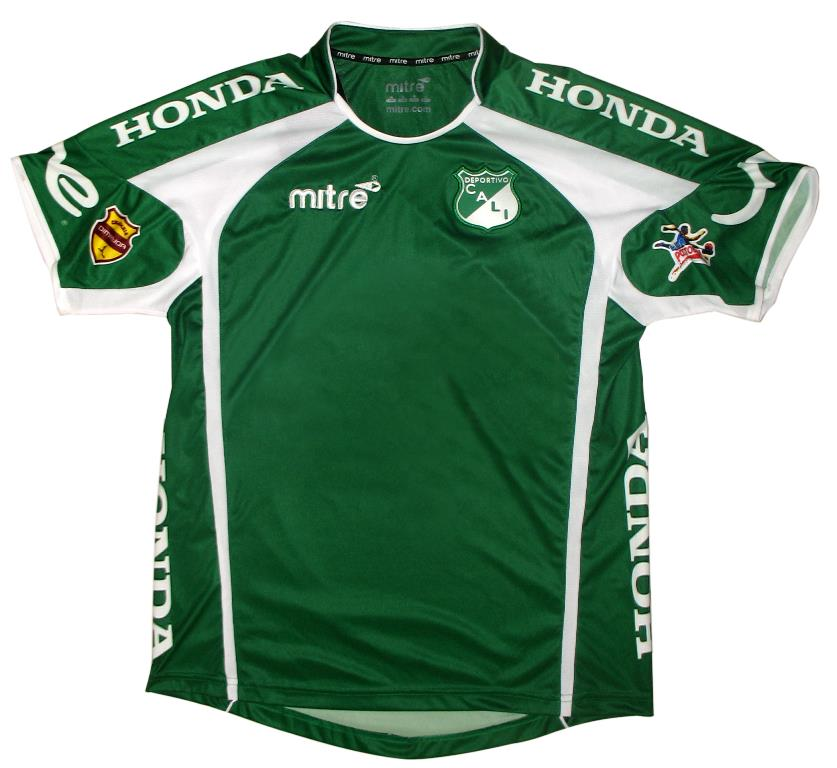 Camiseta Torneo Finalización 2011